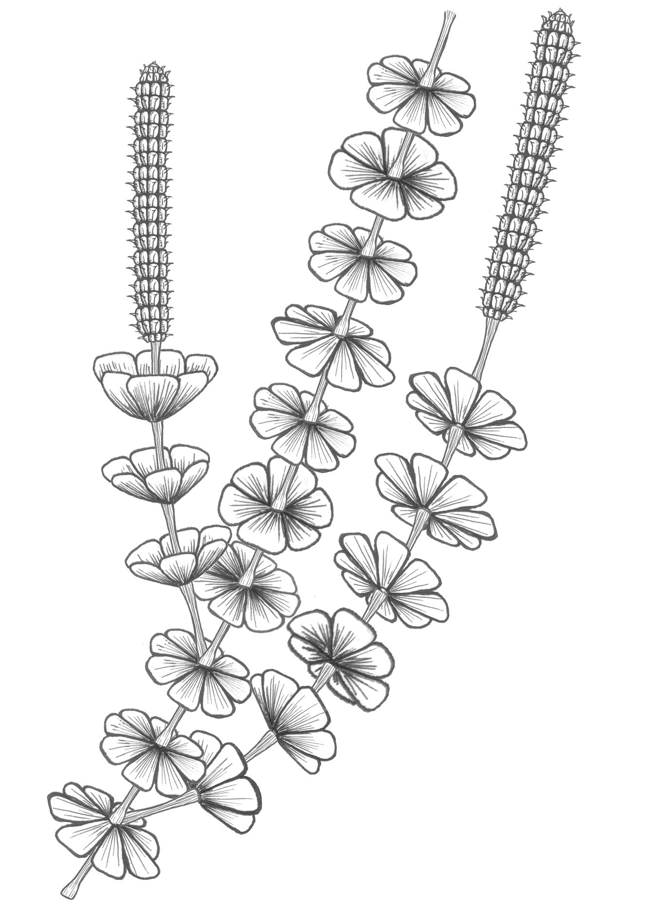 Reconstrucción del vegetal fósil Sphenophyllum a partir de los restos fósiles conocidos.